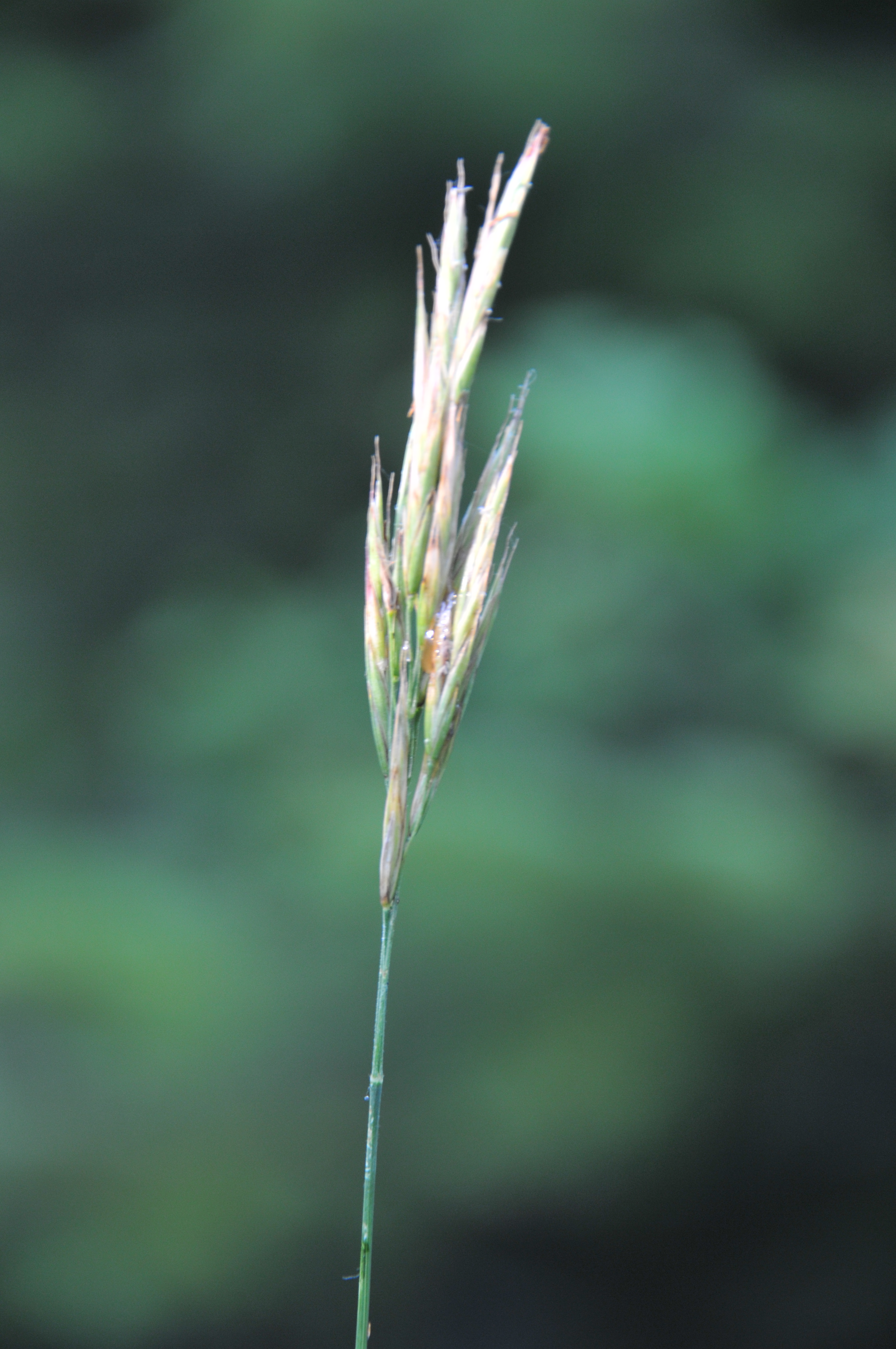 miellat provoqué par Claviceps purpurea